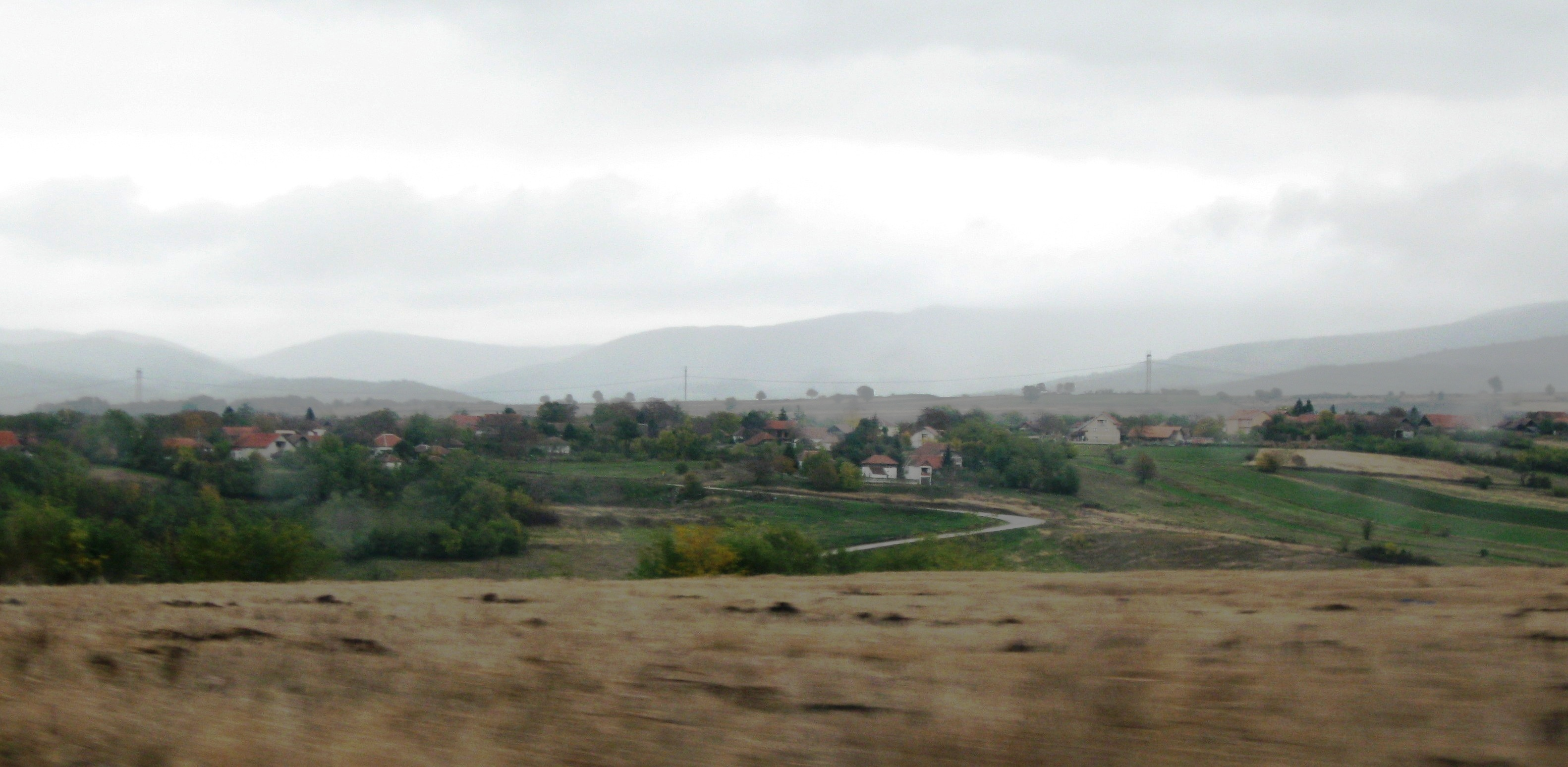 Шетка (Ражањ)